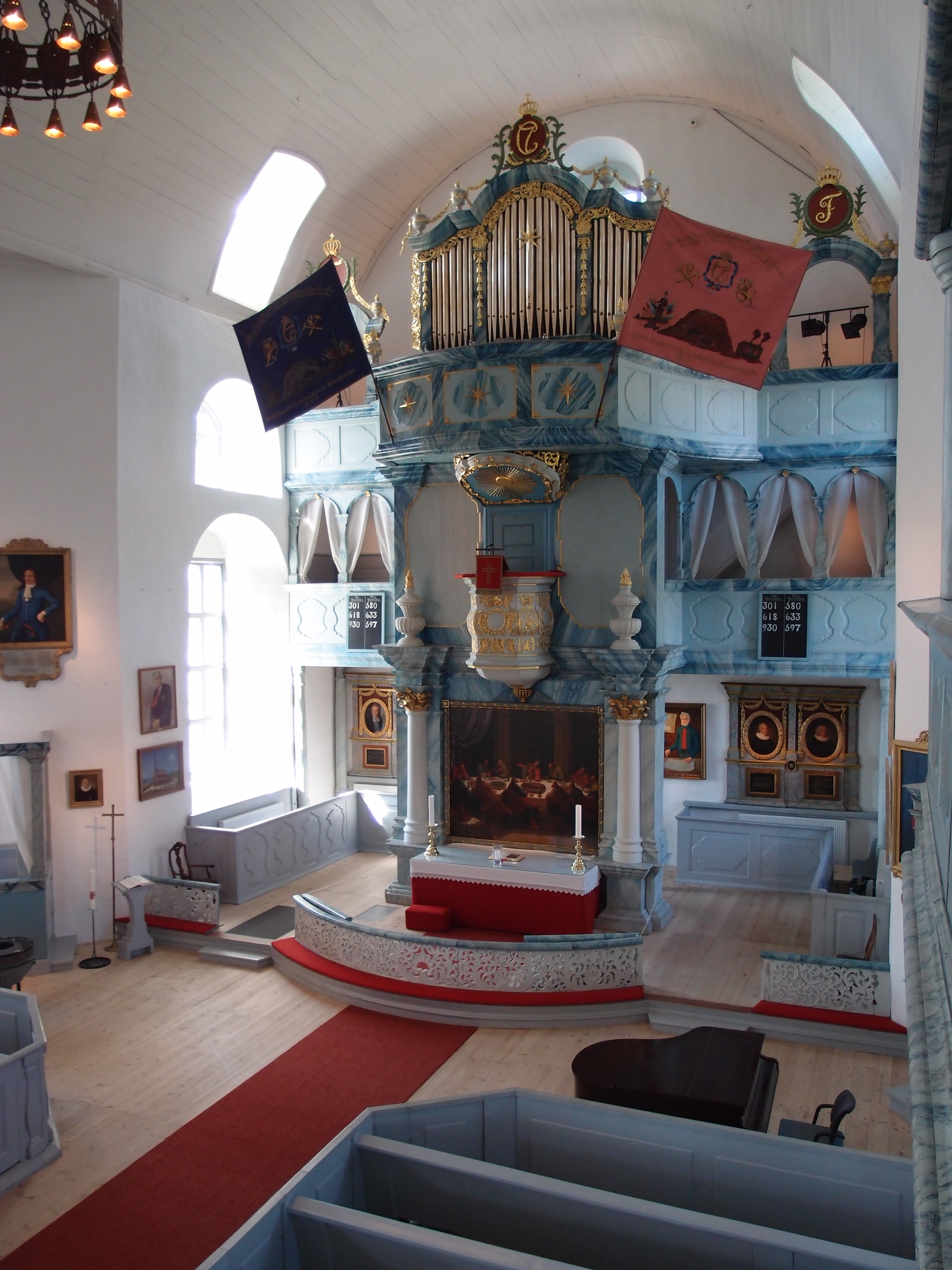 Røros kirke, alterseksjonen fra sidegalleriet